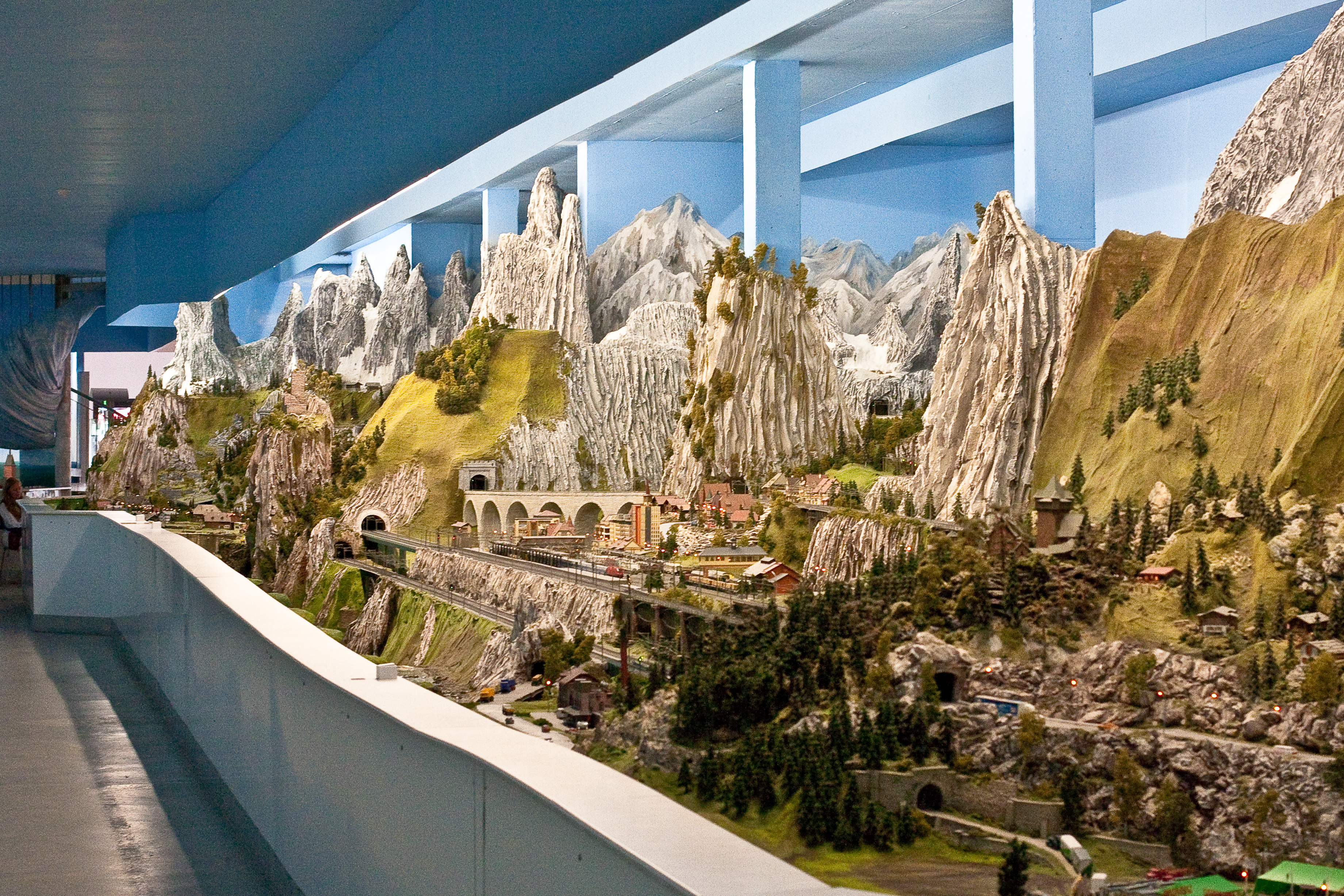 Überblick des Bauabschnitts der Alpen